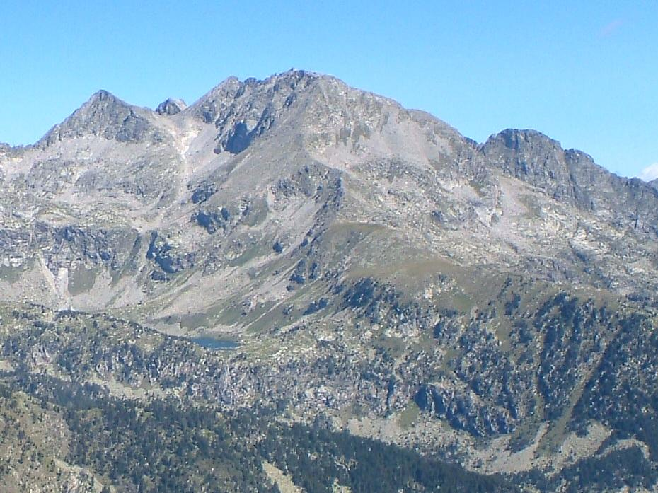 Comaloforno vist des de l'Aüt; la Vall de Boí, Alta Ribagorça, Catalunya